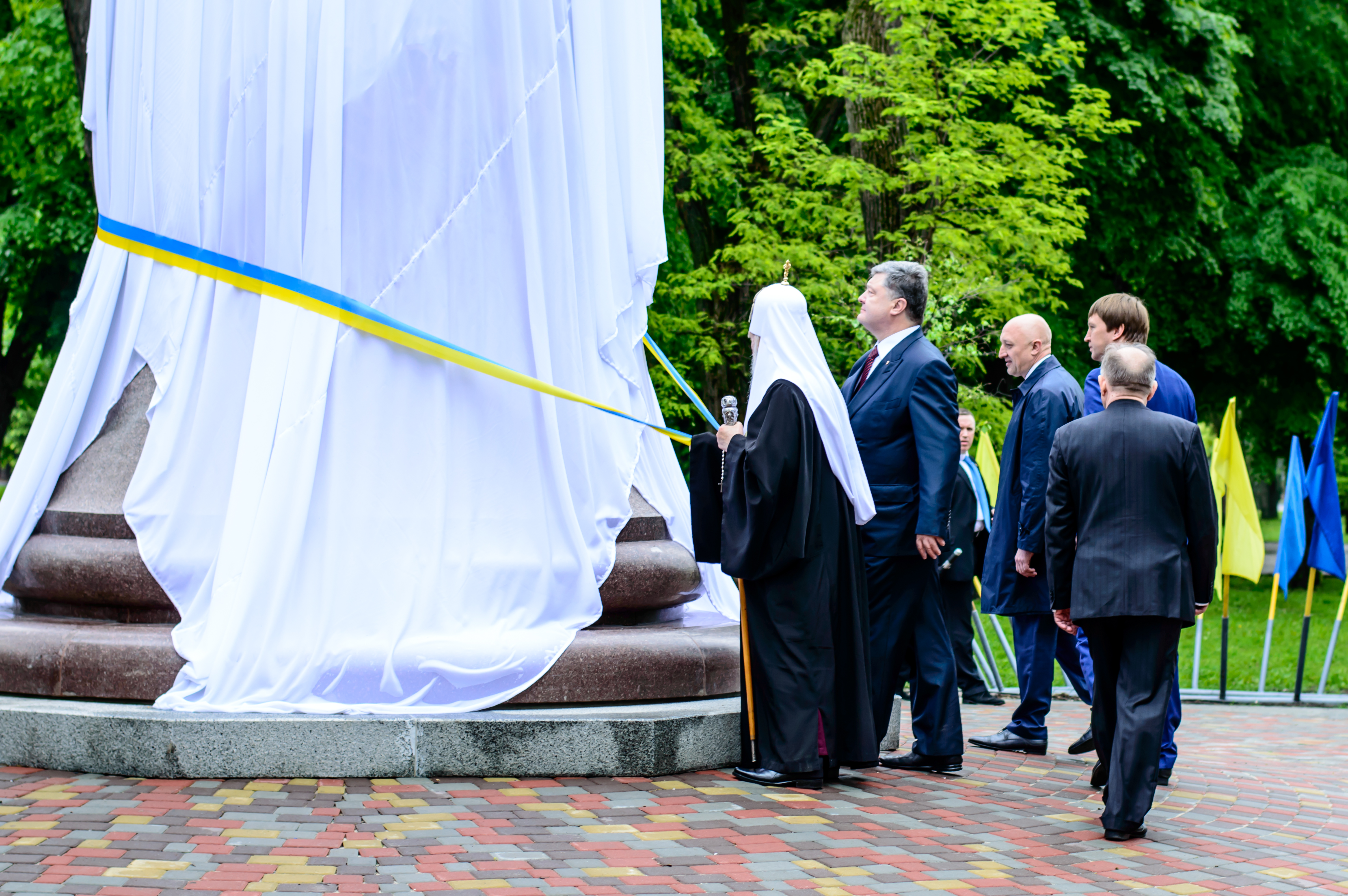 Пам'ятник гетьману Івану Мазепі урочисто відкривають Президент України Петро Порошенко і Святіший Патріарх Київський і всієї Руси-України Філарет